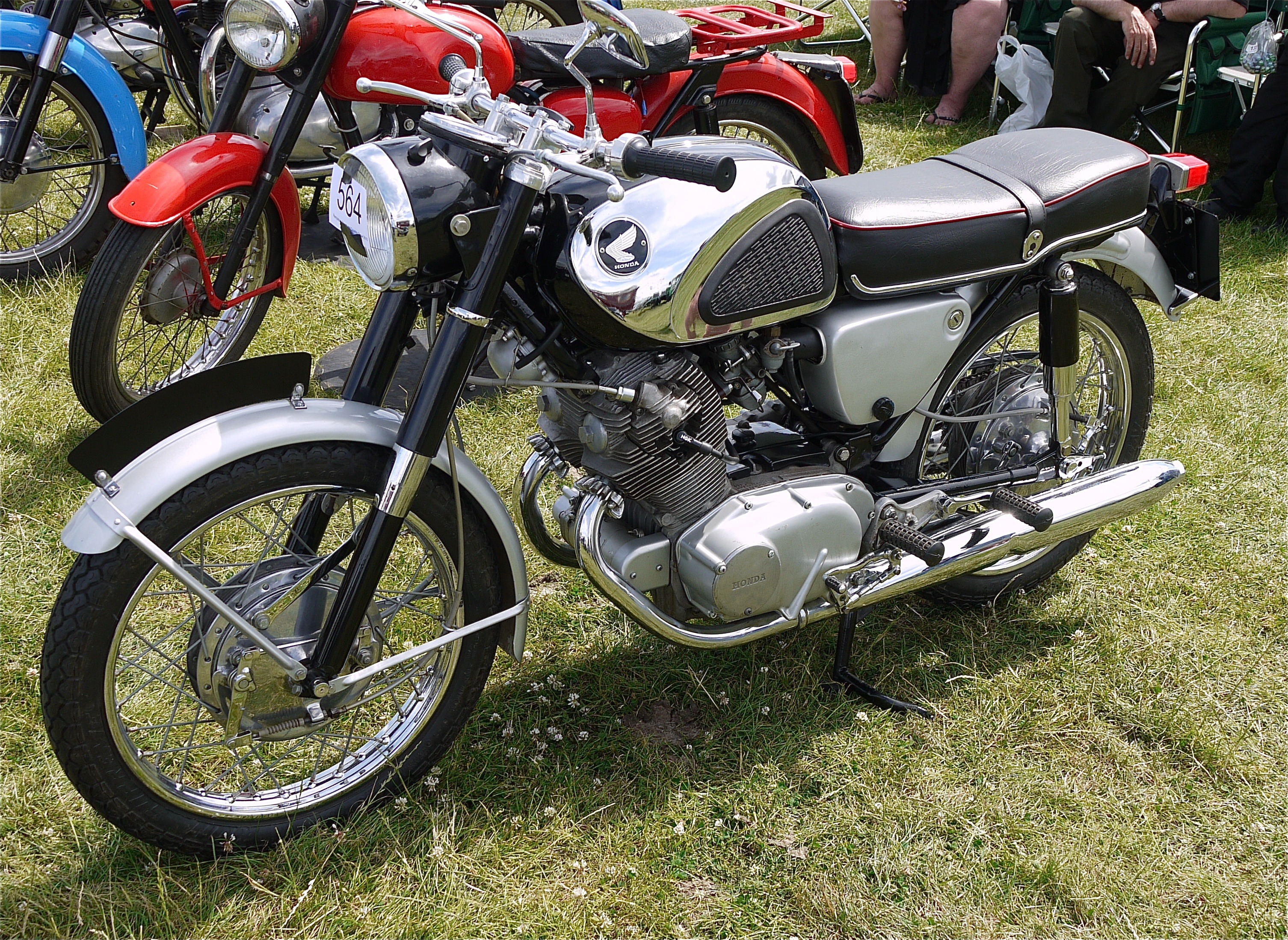 Panasonic G1 14-45 Lens